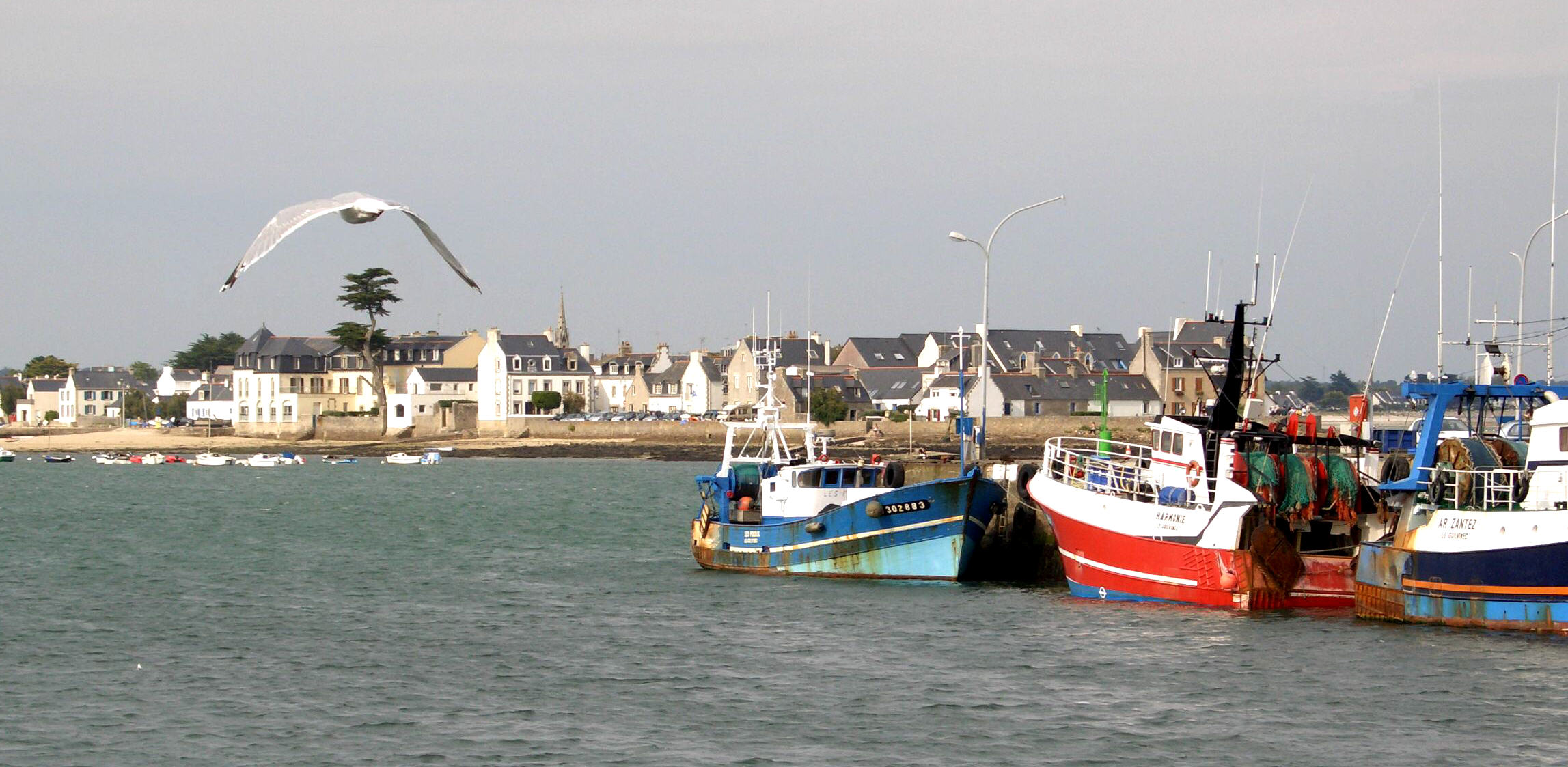 île-Tudy, vue de Loctudy - 2007